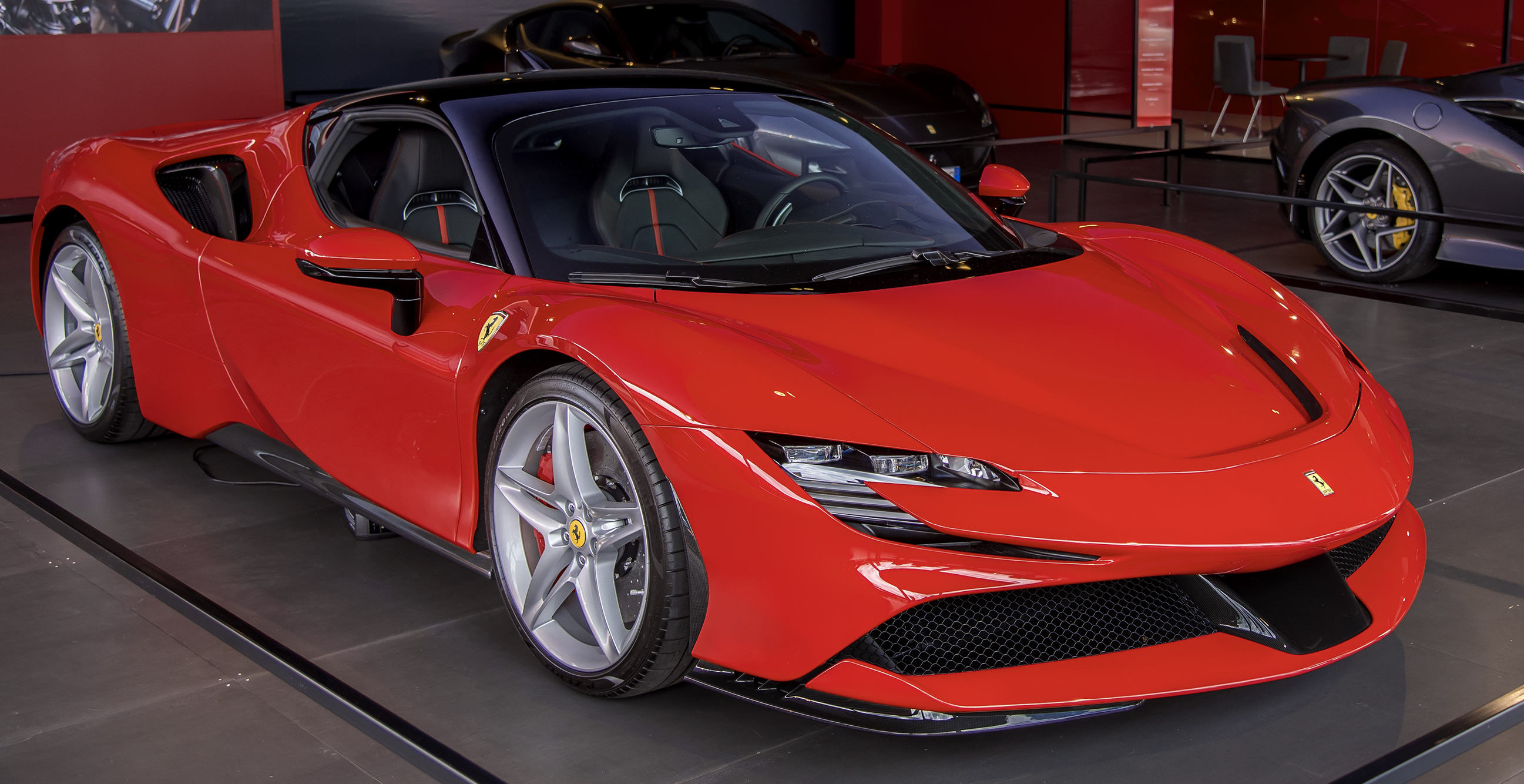 Année du modèle présenté : 2019